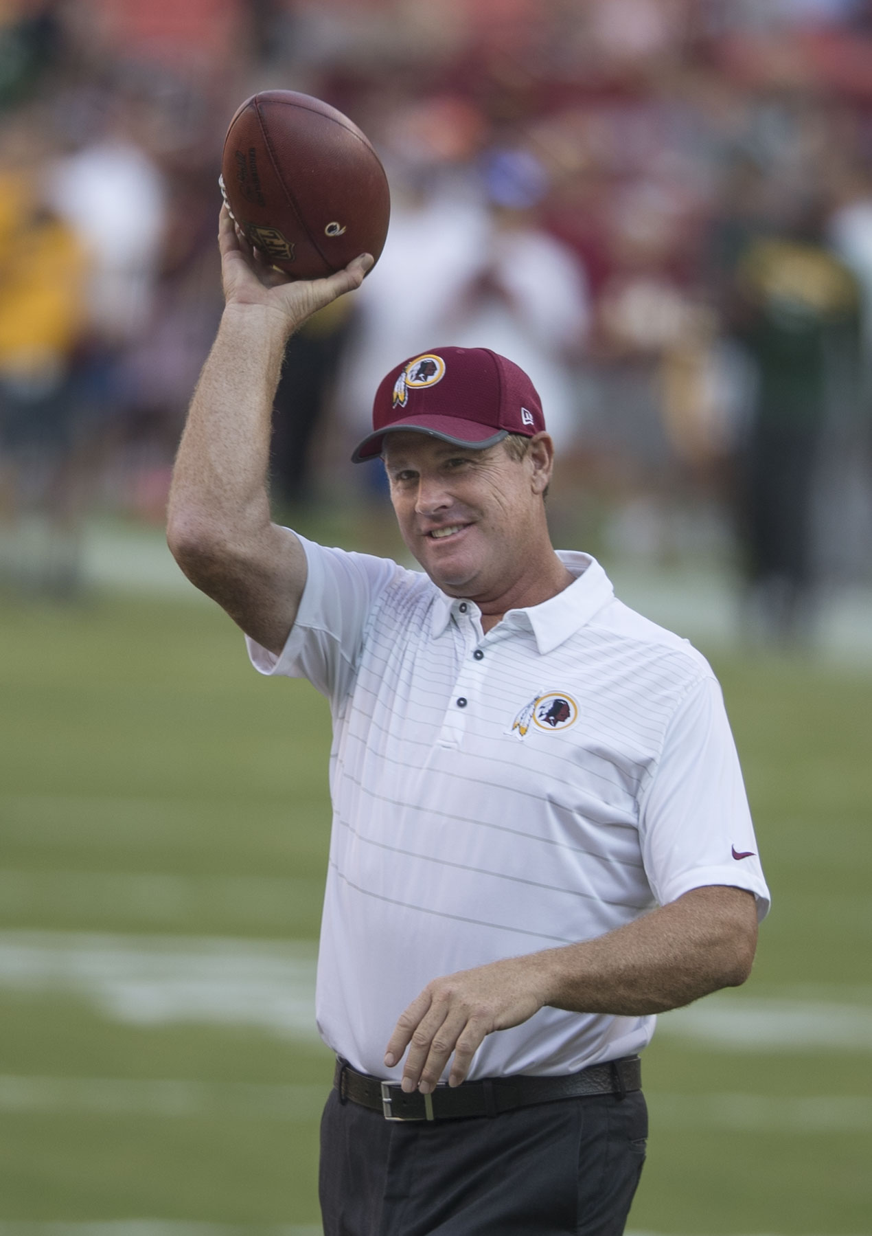 Packers at Redskins 8/19/17